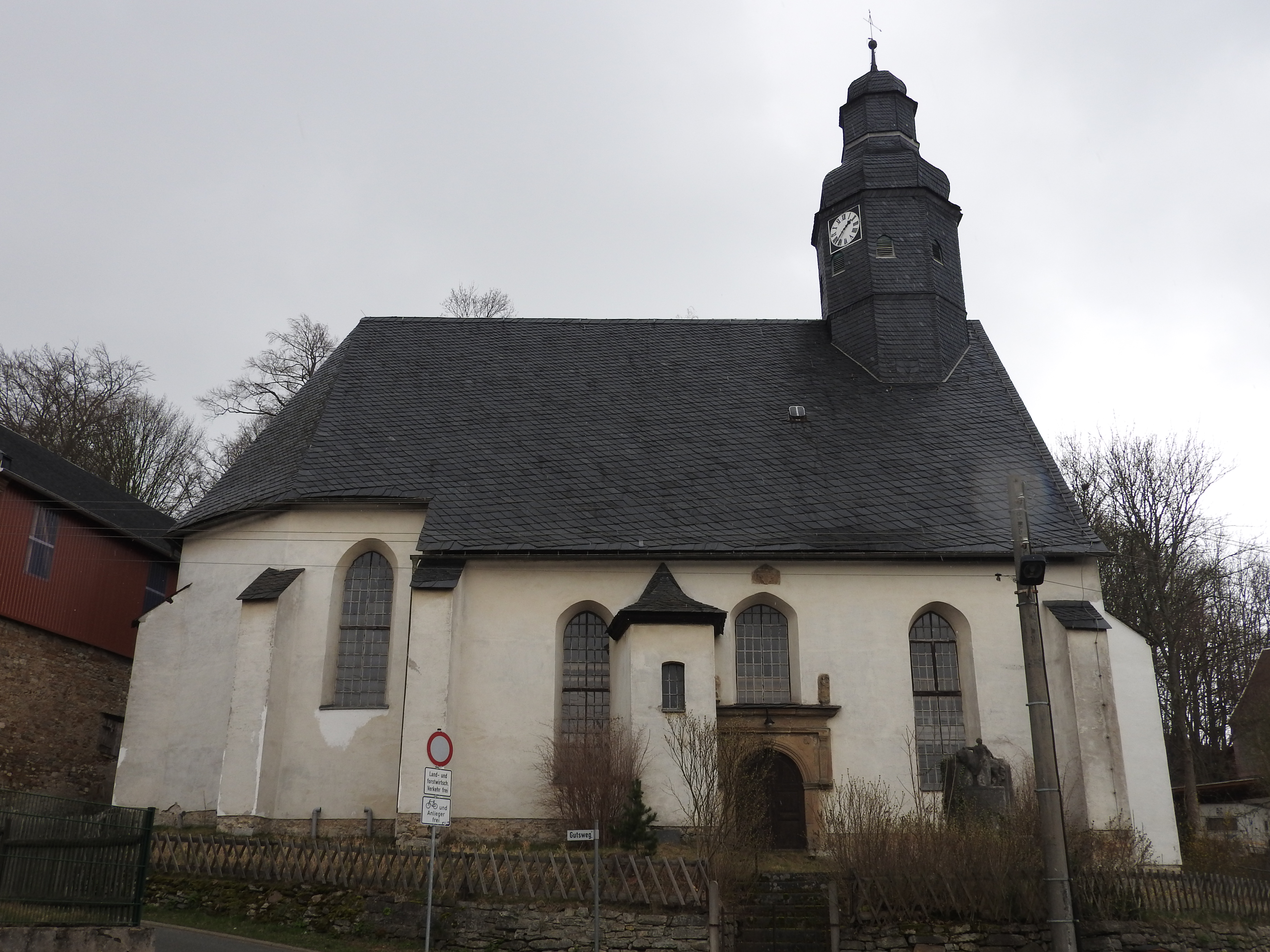 St. Markus Kirche in Oschitz, Schleiz in Thüringen